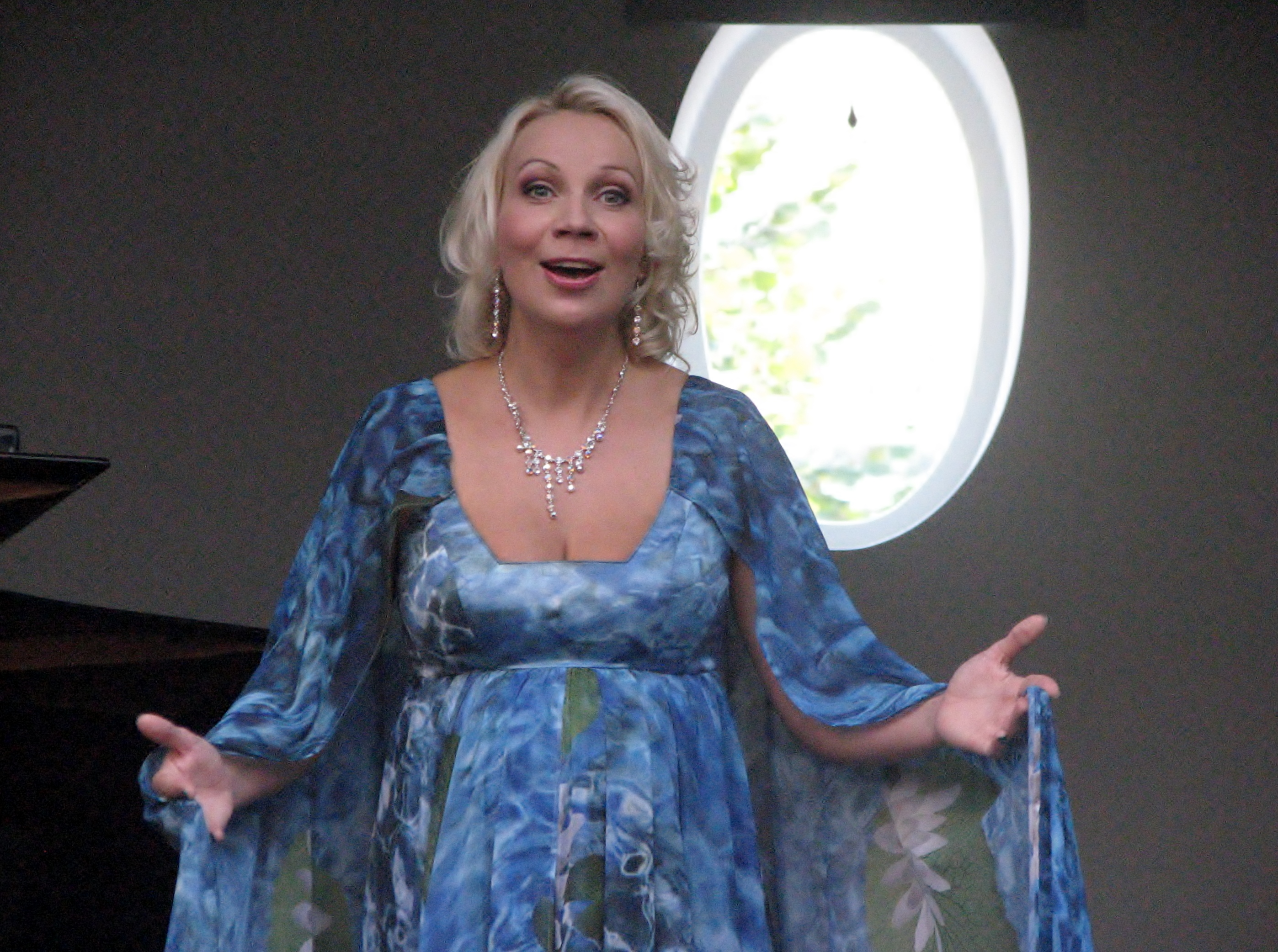 Helen Lokuta Estonia maja juubelipidustuste raames autogrammitunnis